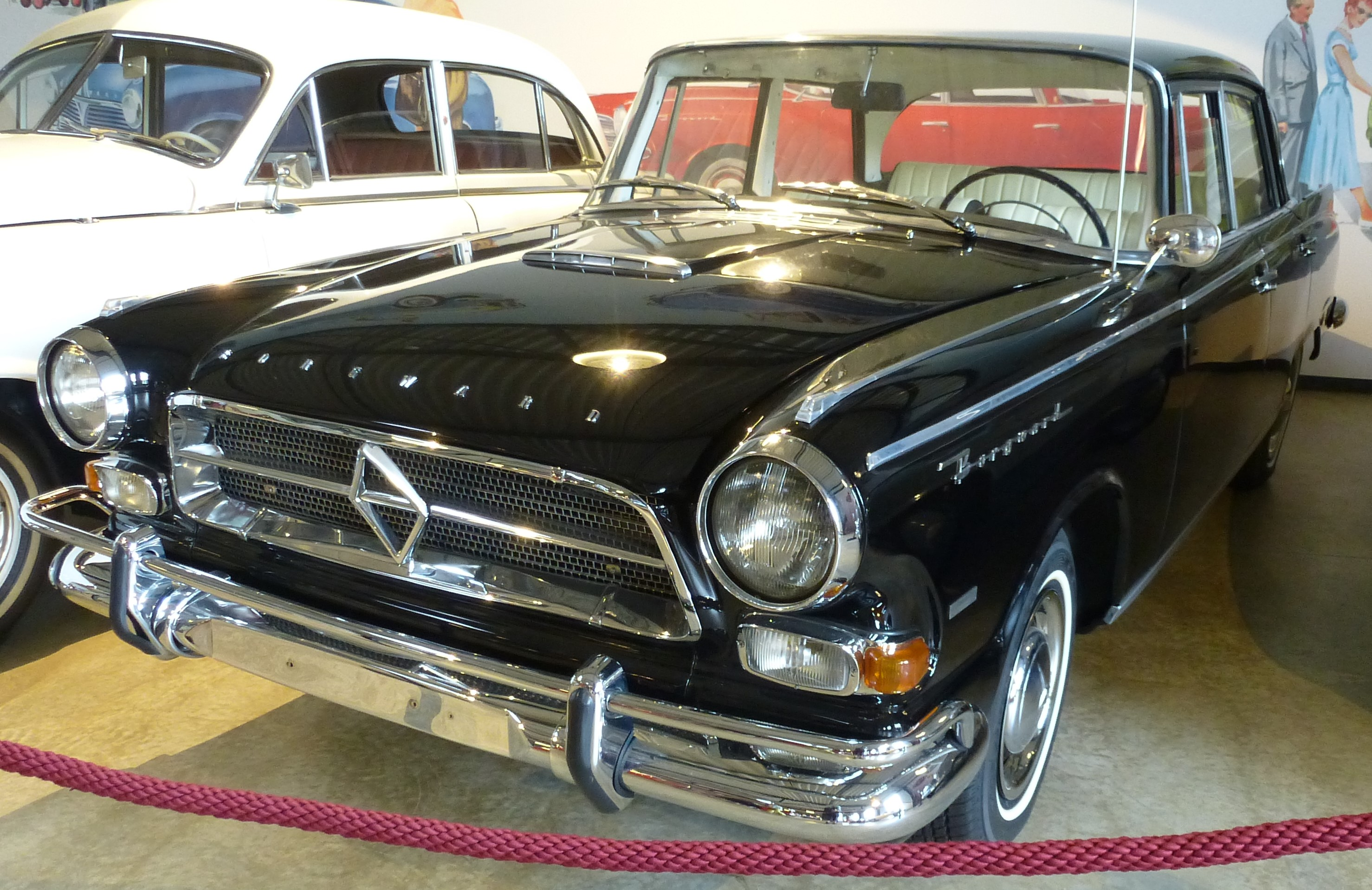 Borgward 230 (aus Mexiko)